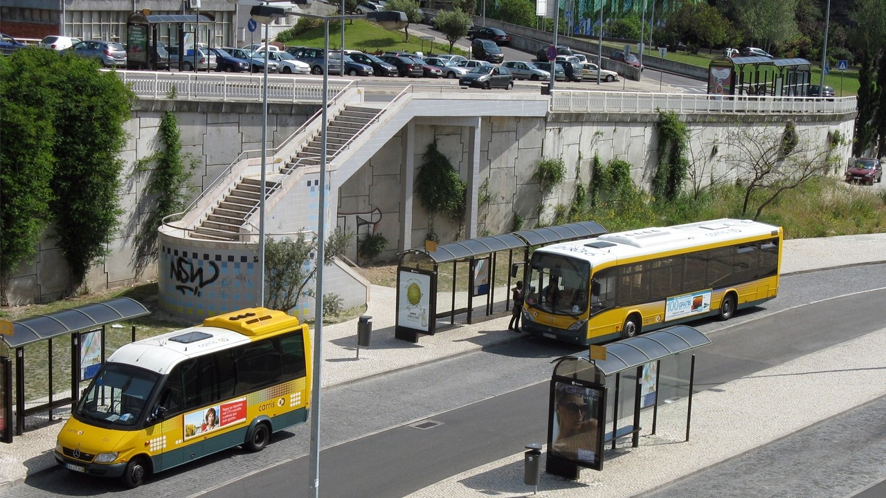 Autocarro Mercedes com a carreira 71 e Man/Viale com a carreira 751